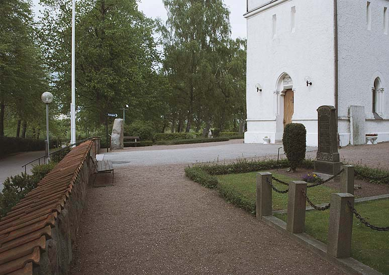 Fosie kyrkogård. Runstenen Dr262, RAÄ-nummer Fosie 3:1, till vänster i bilden. Motiv: Fosie kyrka Kategori: (01) Exteriörer, Runristning/runsten Fosie kyrkogård. Runstenen Dr262, RAÄ-nummer Fosie 3:1, till vänster i bilden.